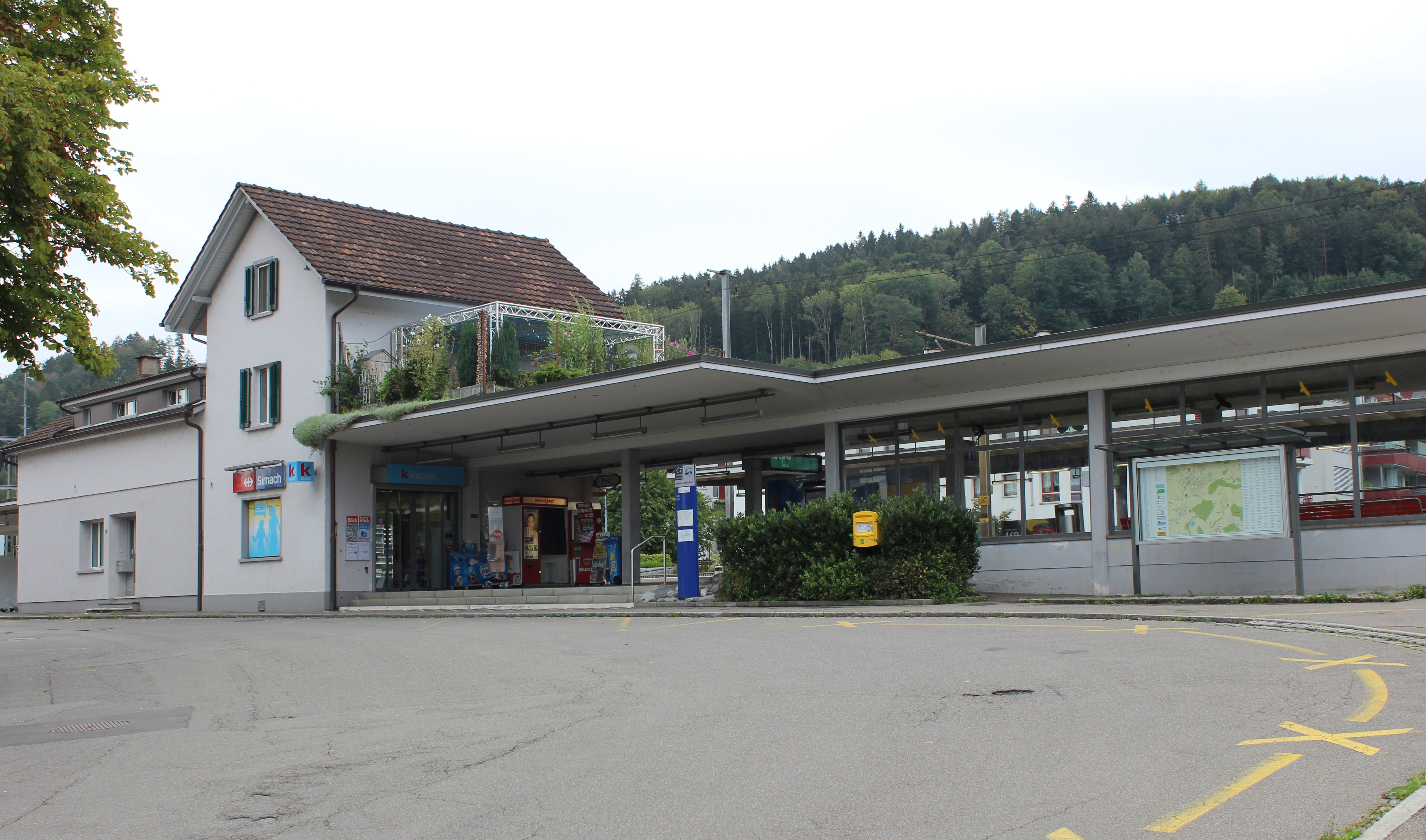 Bahnhof Sirnach aus Richtung Nordwest